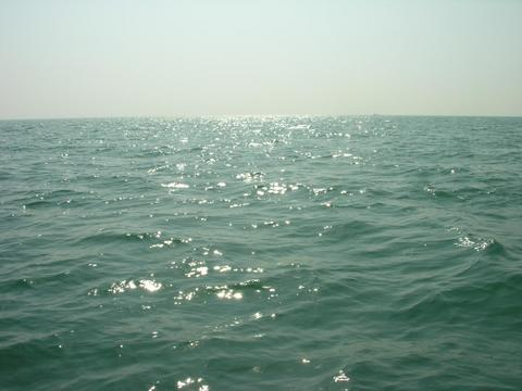 Bay of Bengal